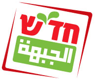 Logo der israelischen Partei Chadasch (חד"ש)